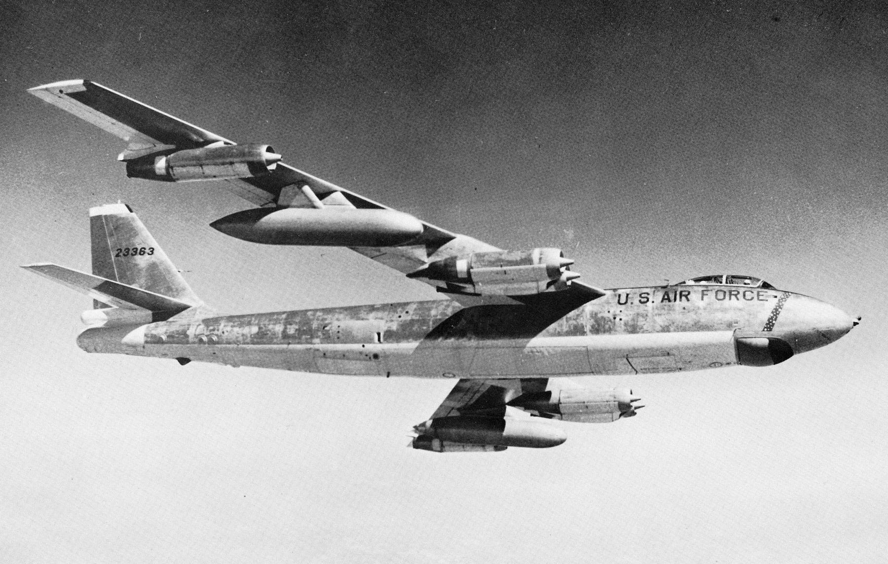 Boeing B-47E-50-LM (S/N 52-3363) in flight.